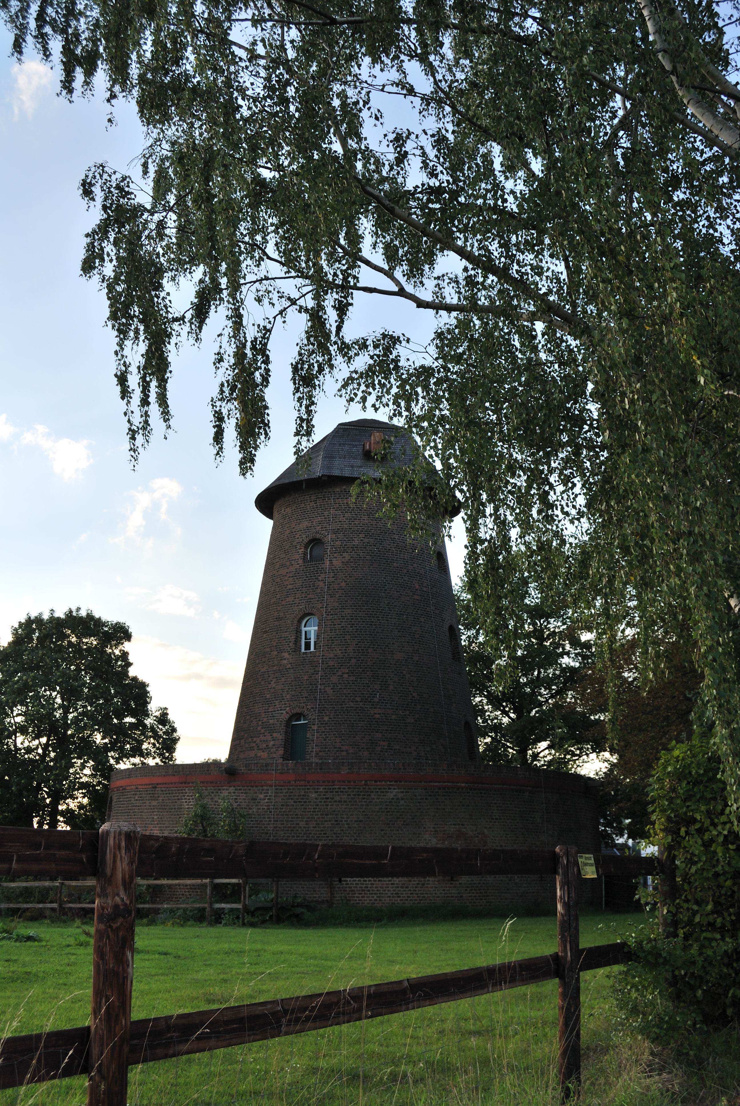 Denkmalnummer 38